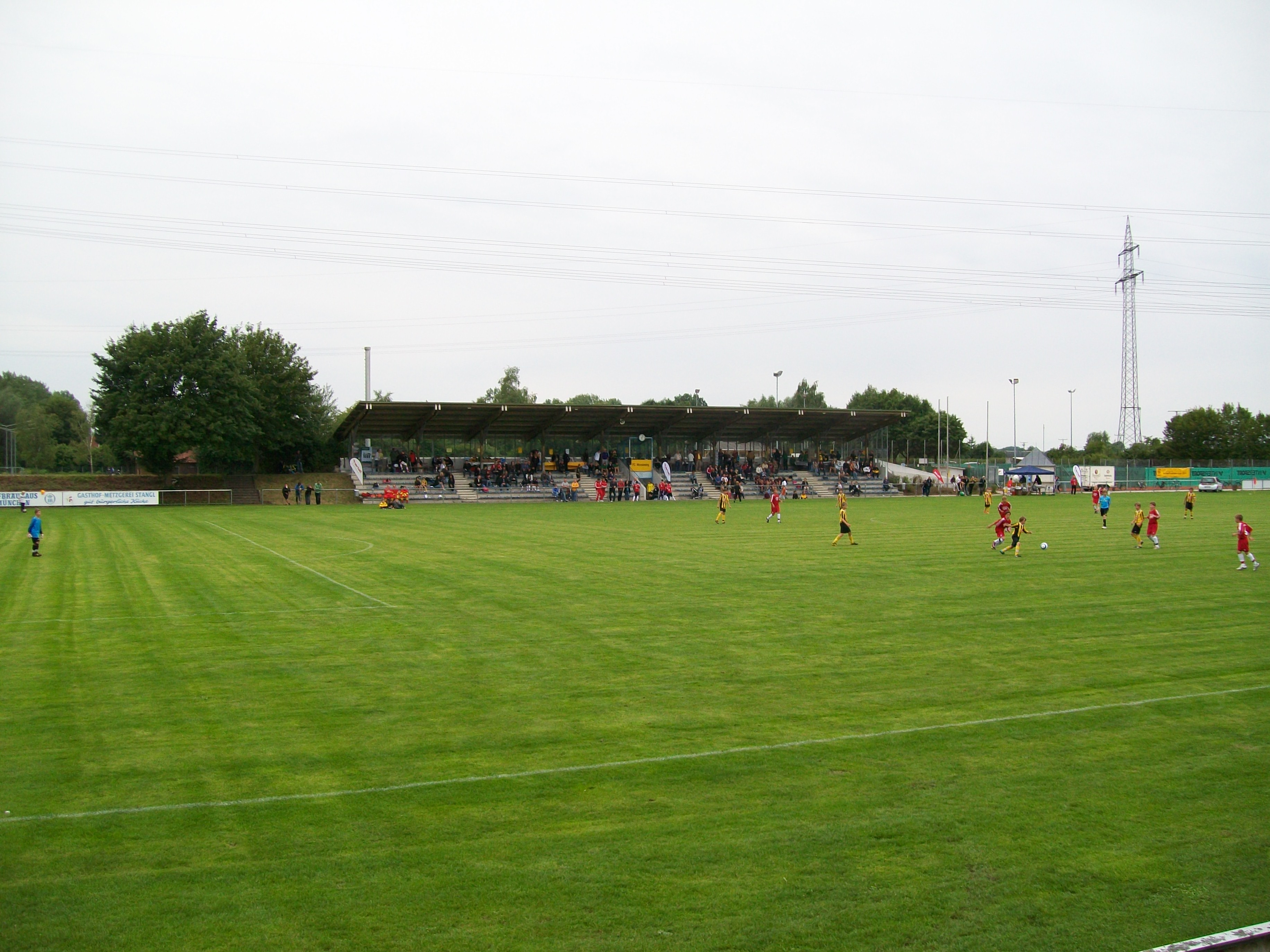 Das Sportgelände des FC Moosinning bei einem Jugendturnier